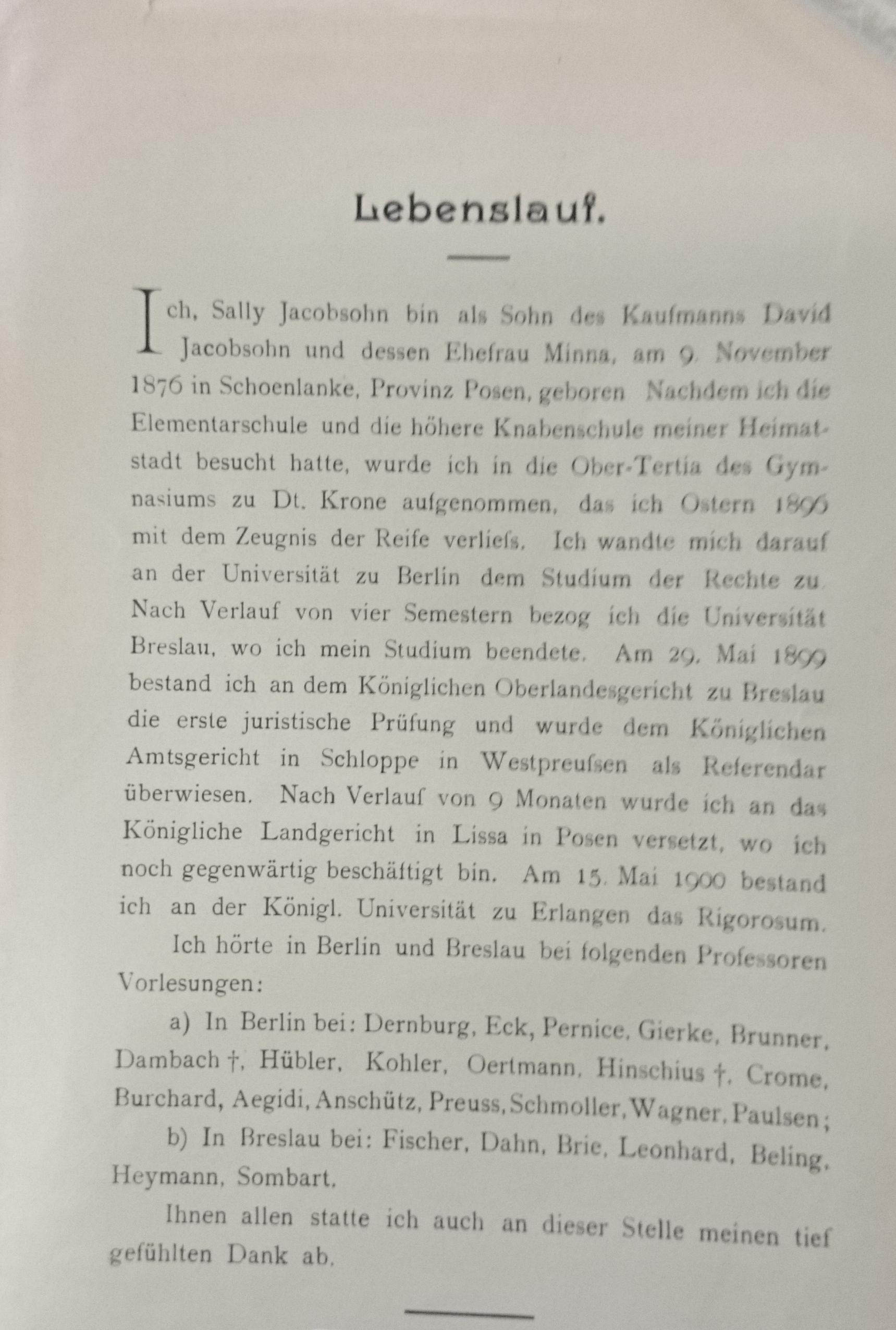 Lebenslauf aus: Rücktrittsrecht des Gläubigers in mora debitoris (nach gemeinem Recht). Dissertation Erlangen 1900, Seite 63